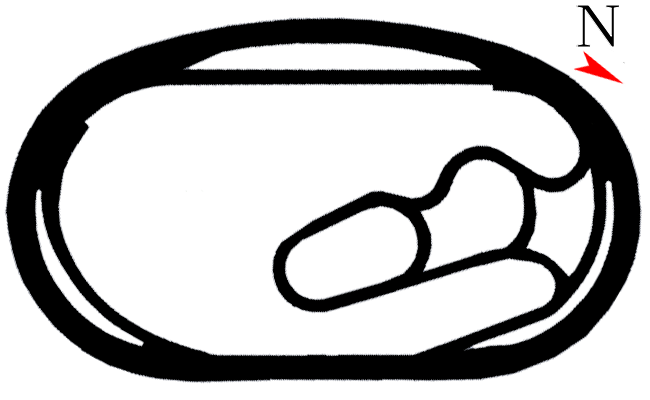 Mapa do Pikes Peak International Raceway.